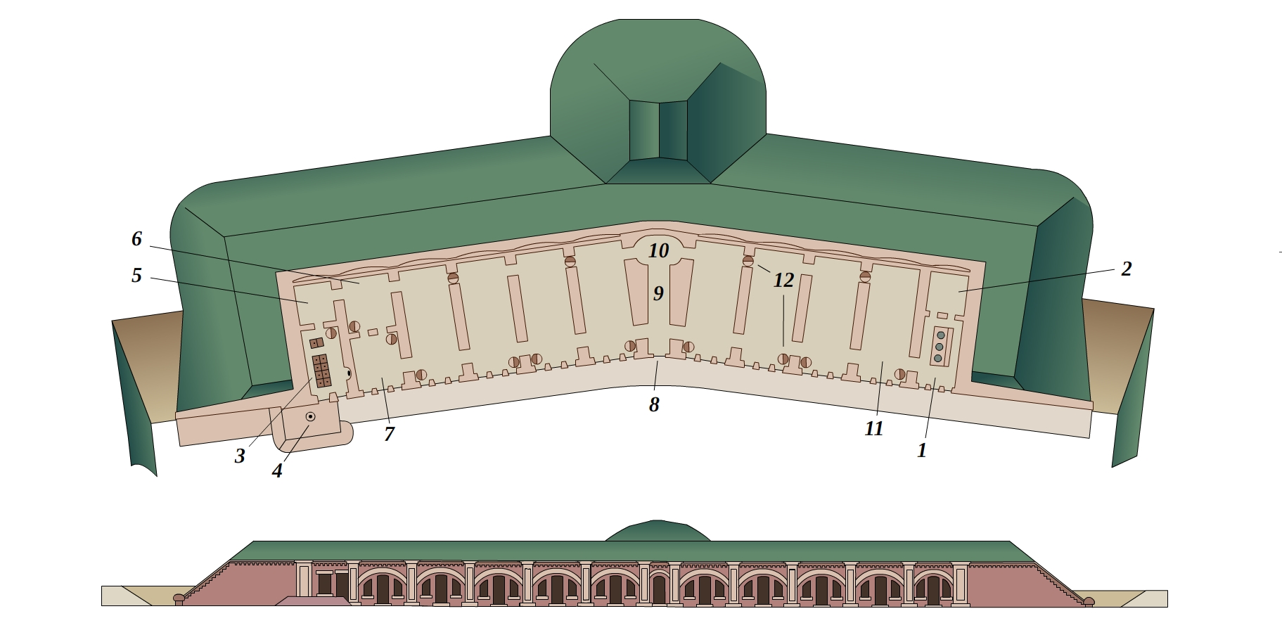 План казармы форта IV Брест Литовской крепости (1880-е). 1 — каземат кухни, 2 — хранилище для продуктов, 3 — каземат туалета, 4 — выгребная яма, 5 — каземат карцера, 6 — комната фельдфебелей роты, 7 — цейхгауз, 8 — вход в казарму, 9 — коридор, 10 — умывальная, 11 — столовая, 12 — печи.